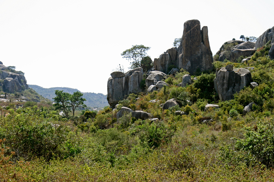 Tarime